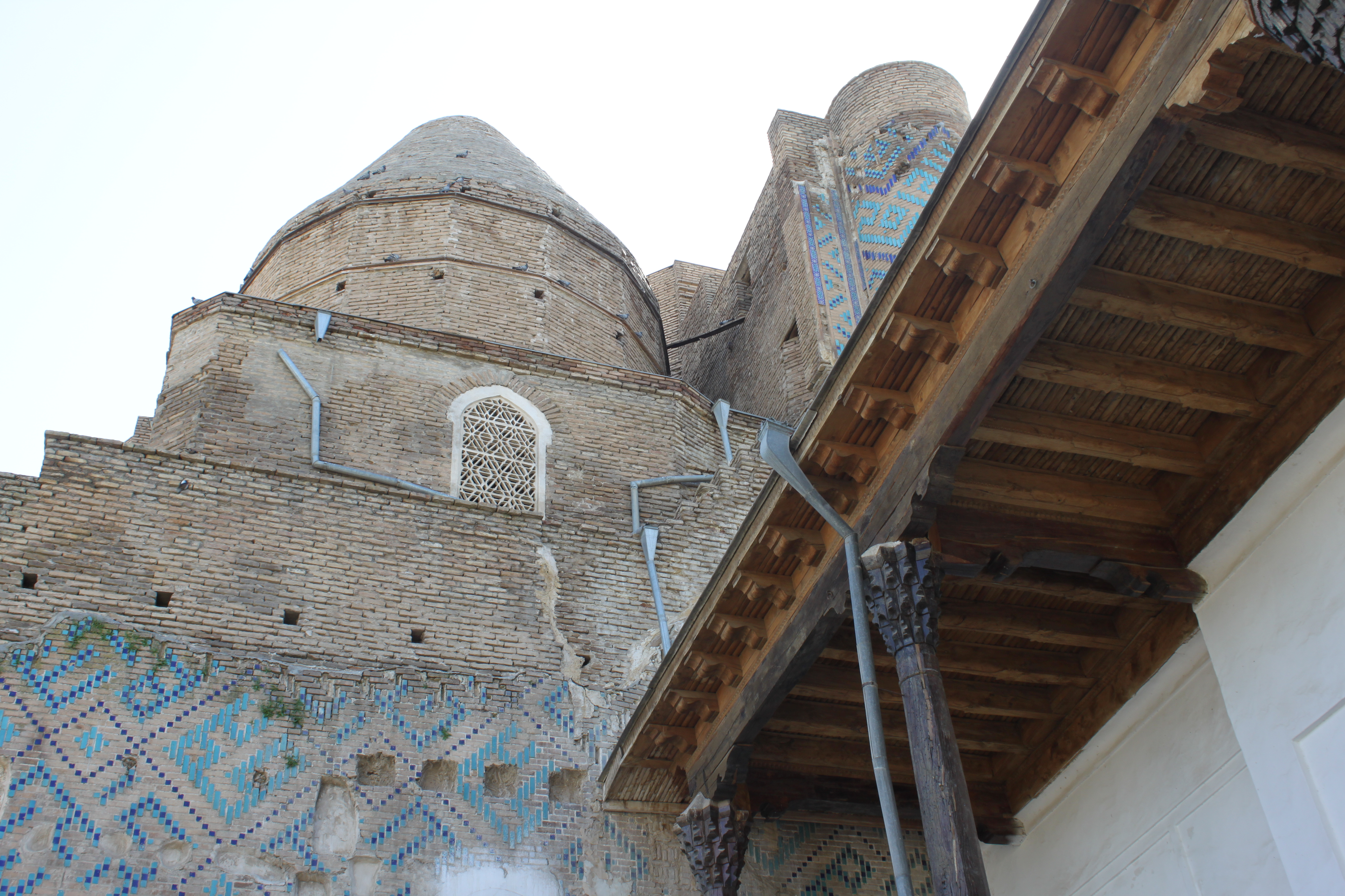 Mausolée de Djahangir à Shahrisabz